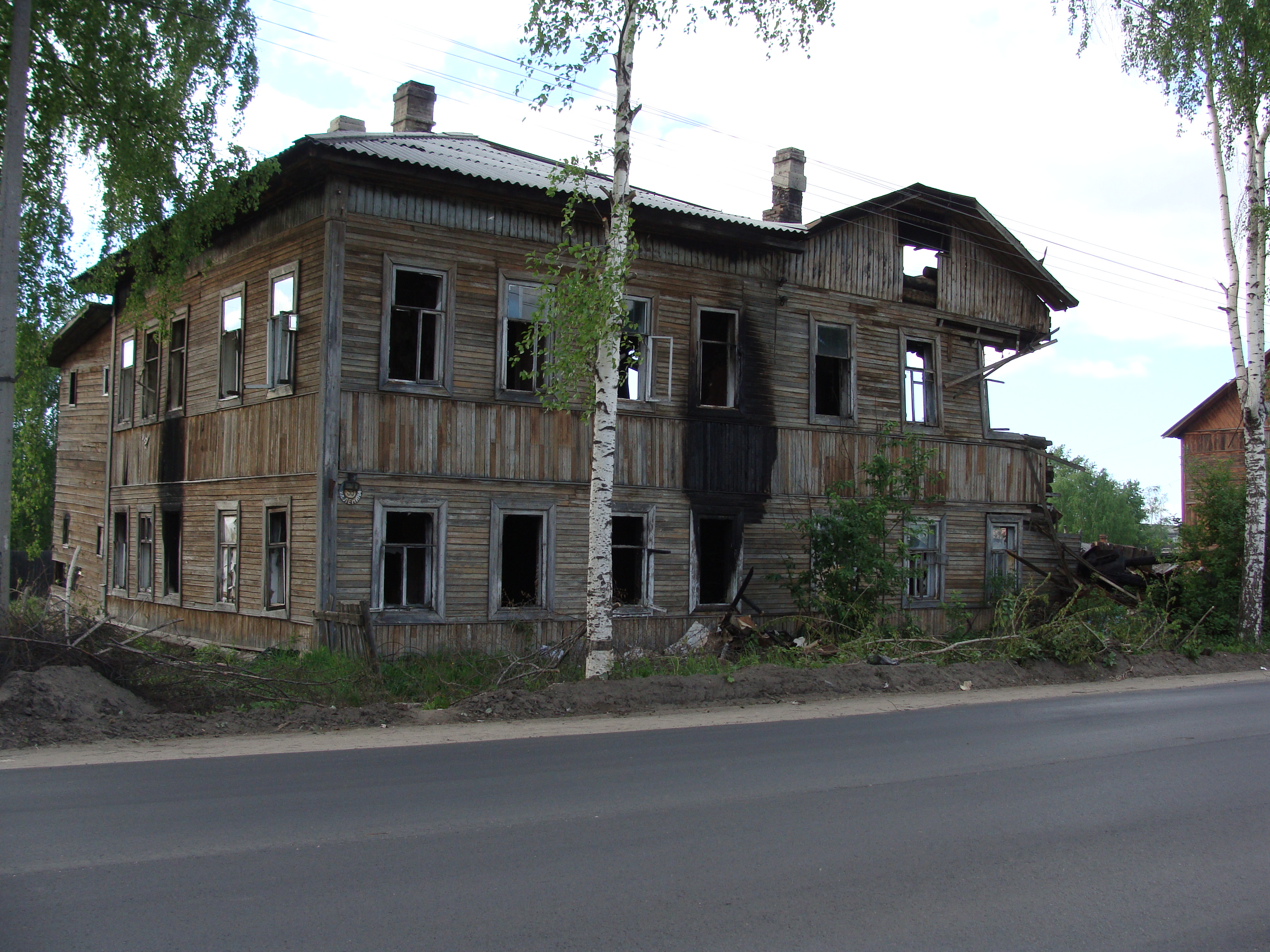 ул. Ленина д.53, Котлас